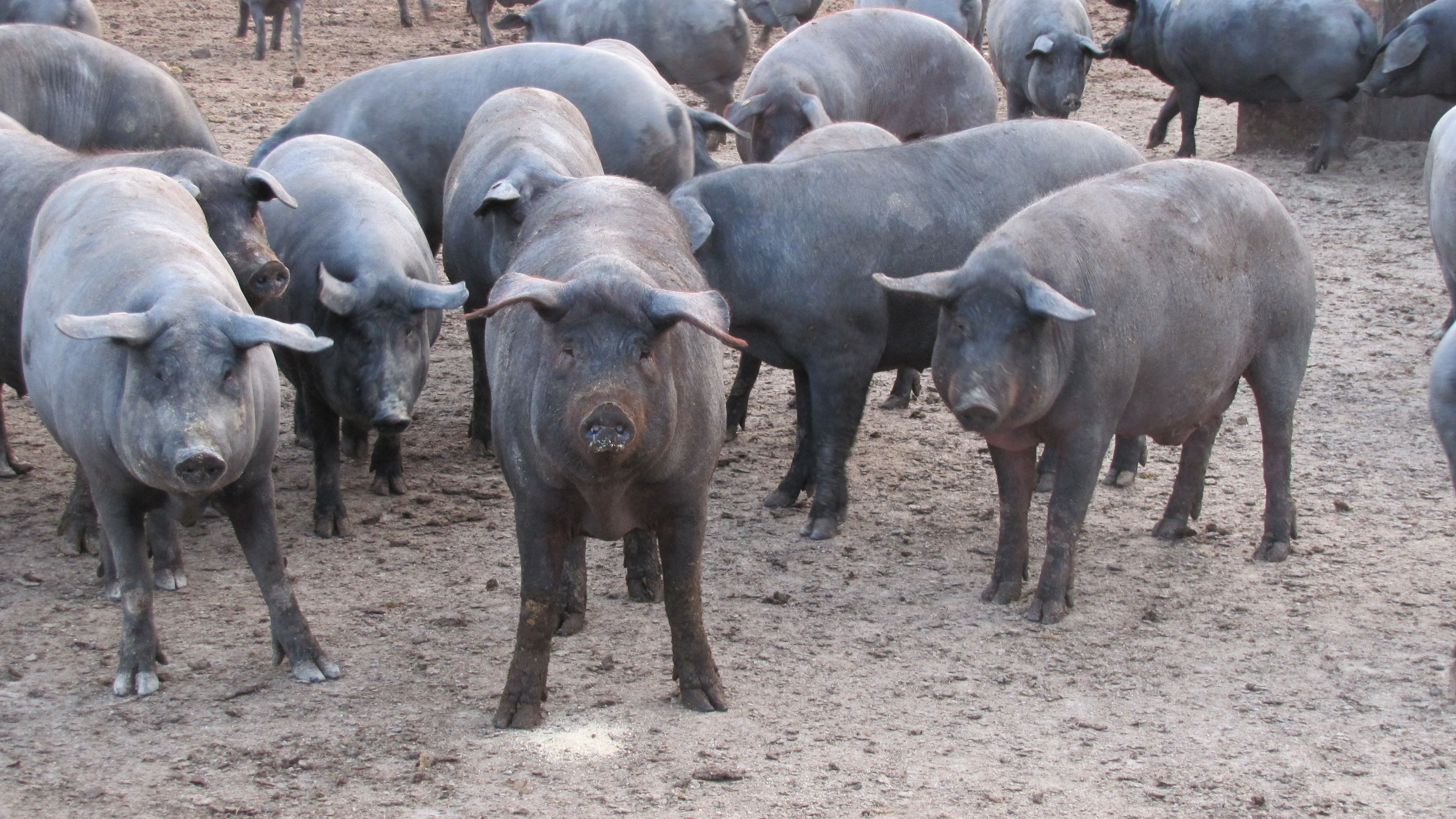 Varios Cerdos Ibéricos Adultos, en la finca Los Valhondos, en Pelayos, Salamanca (España). Son cerdos de la raza ibérica, criados en la Dehesa salmantina, para la producción de jamón de bellota con la Denominación de Origen Jamón de Guijuelo, para BEHER, Bernardo Hernández.